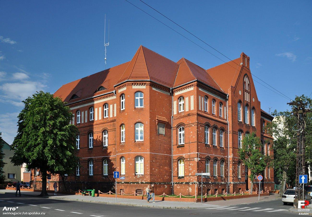 Gmach Sądu Rejonowego w Świnoujściu.